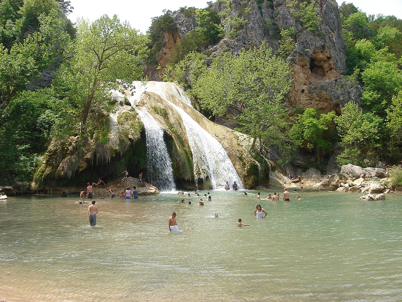 Turner Falls - Davis, Oklahoma.